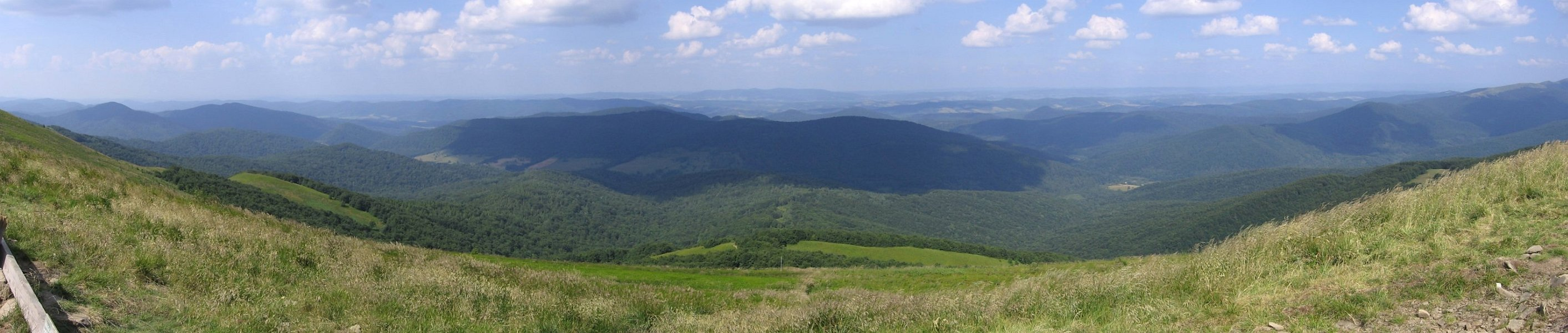 View from Połonina Caryńska (northern side)